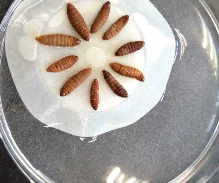 Nématodes Heterorhabditis downesi émergeant de larves de Galleria mellonella dans un dispositif de "white trap"